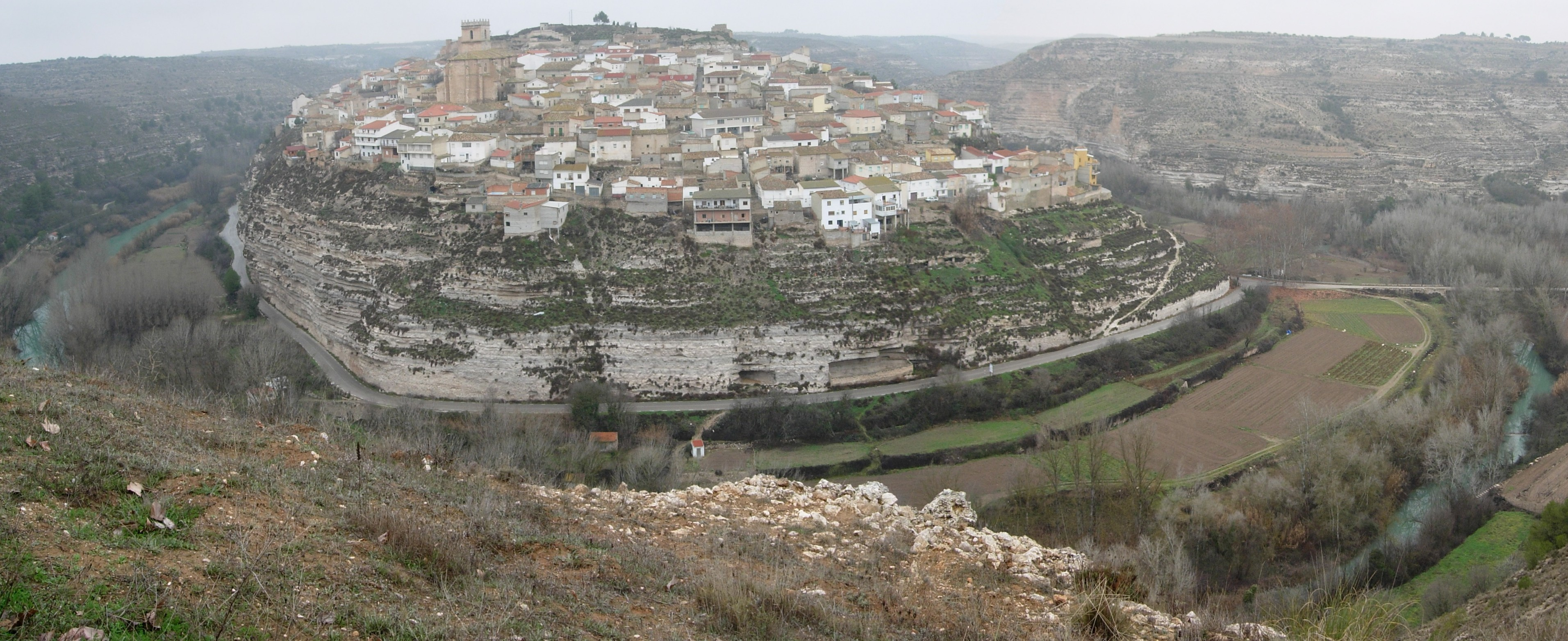 Vista panorámica de Jorquera, en Albacete (España)